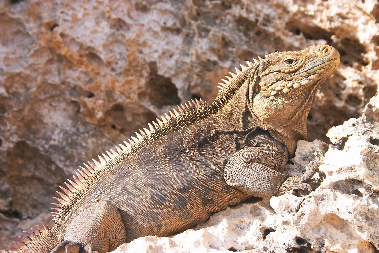 Cayo Largo, Cuba